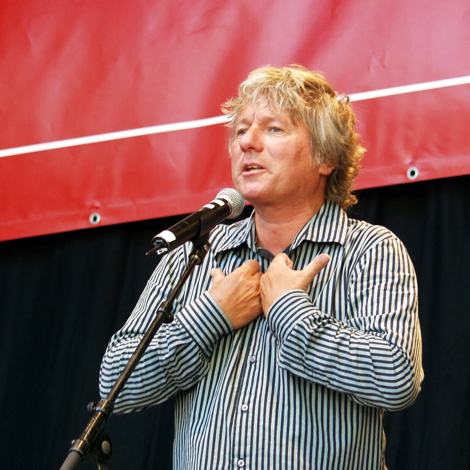 Jürgen Becker auf einer Veranstaltung zum „Kölner Herztag“ 2007 („Kölner Infarkt Modell“) auf dem Kölner Neumarkt.